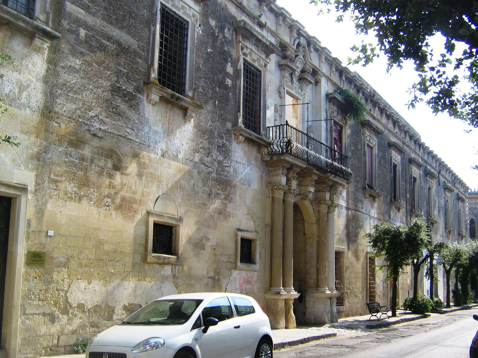 Carpignano Salentino Palazzo ducale Ghezzi